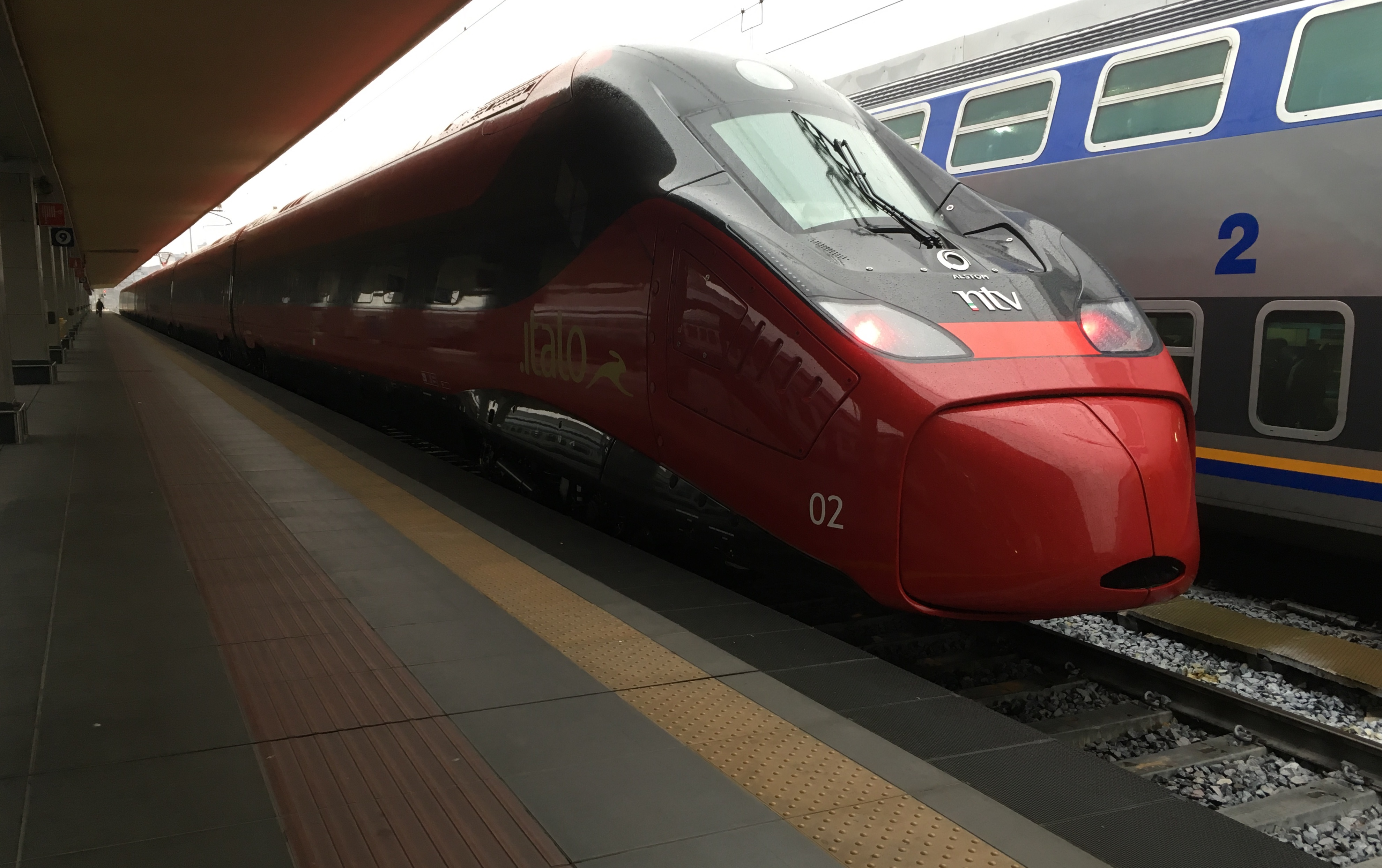 ETR 675